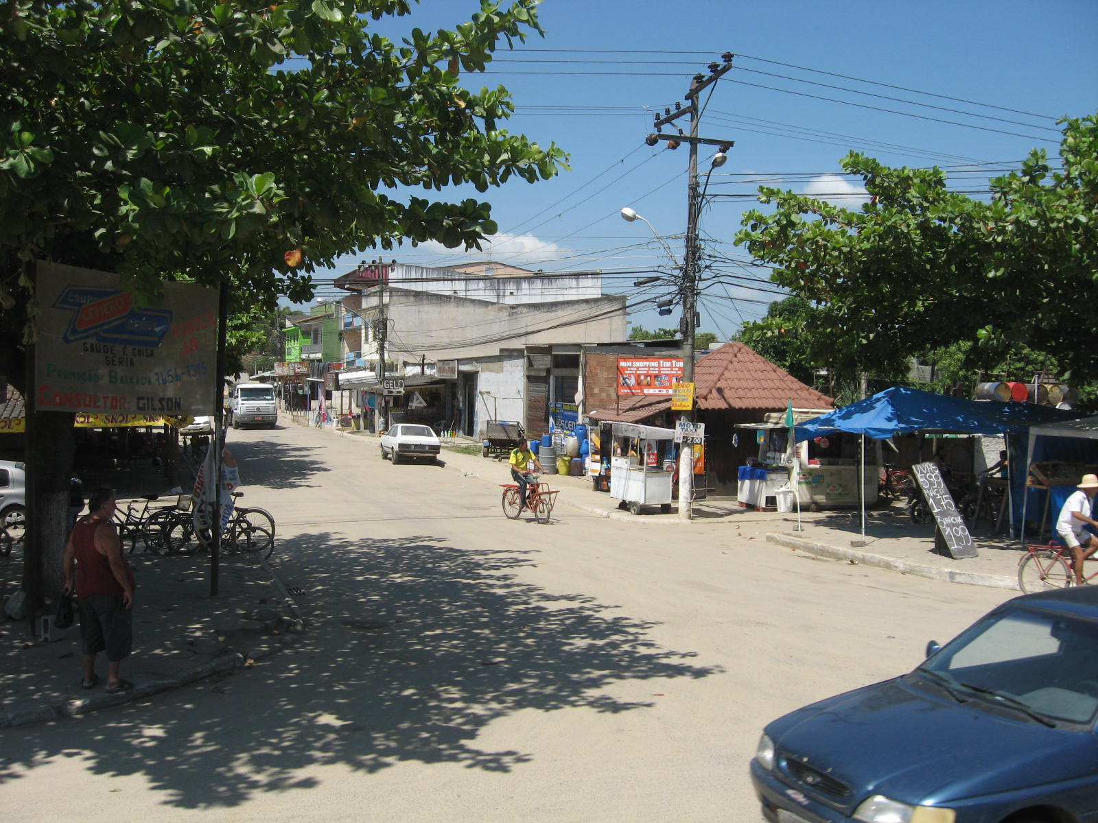 Vista de Seropédica, estado do Rio de Janeiro.